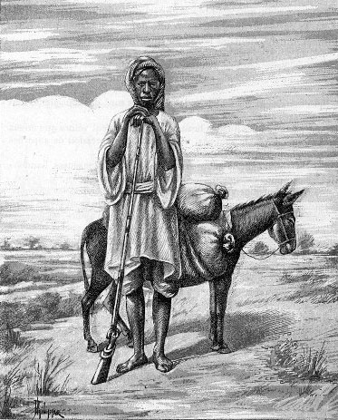 Le Sarrakholais caravanier (illustration de Côte occidentale d'Afrique du Colonel Frey, fig. 61, p. 97)